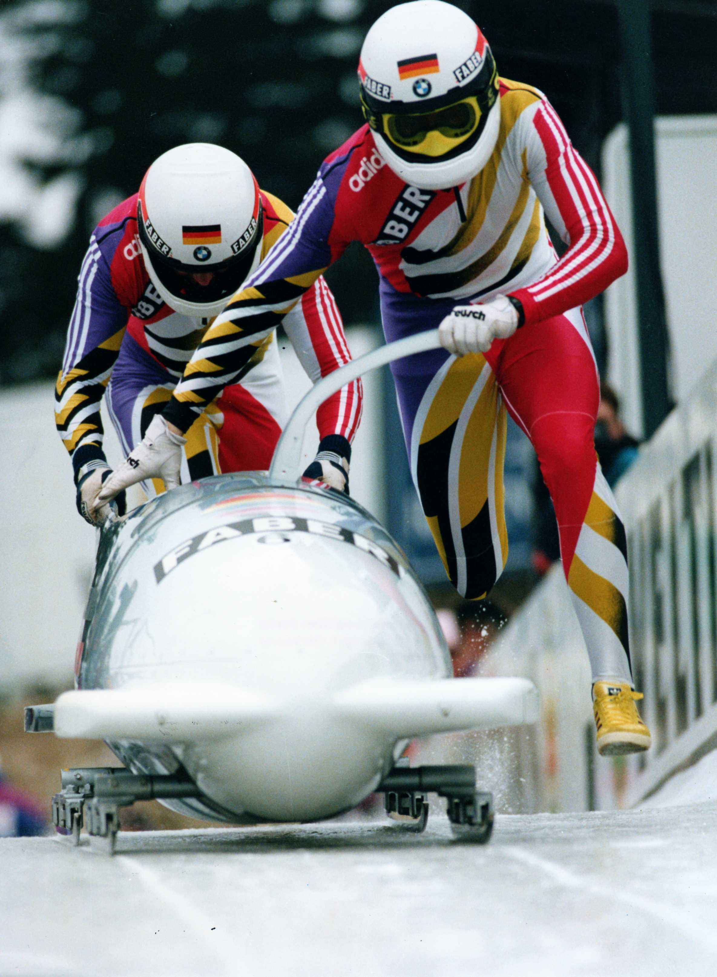 Start bei der Bob Europameisterschaft 1993 in St. Moritz